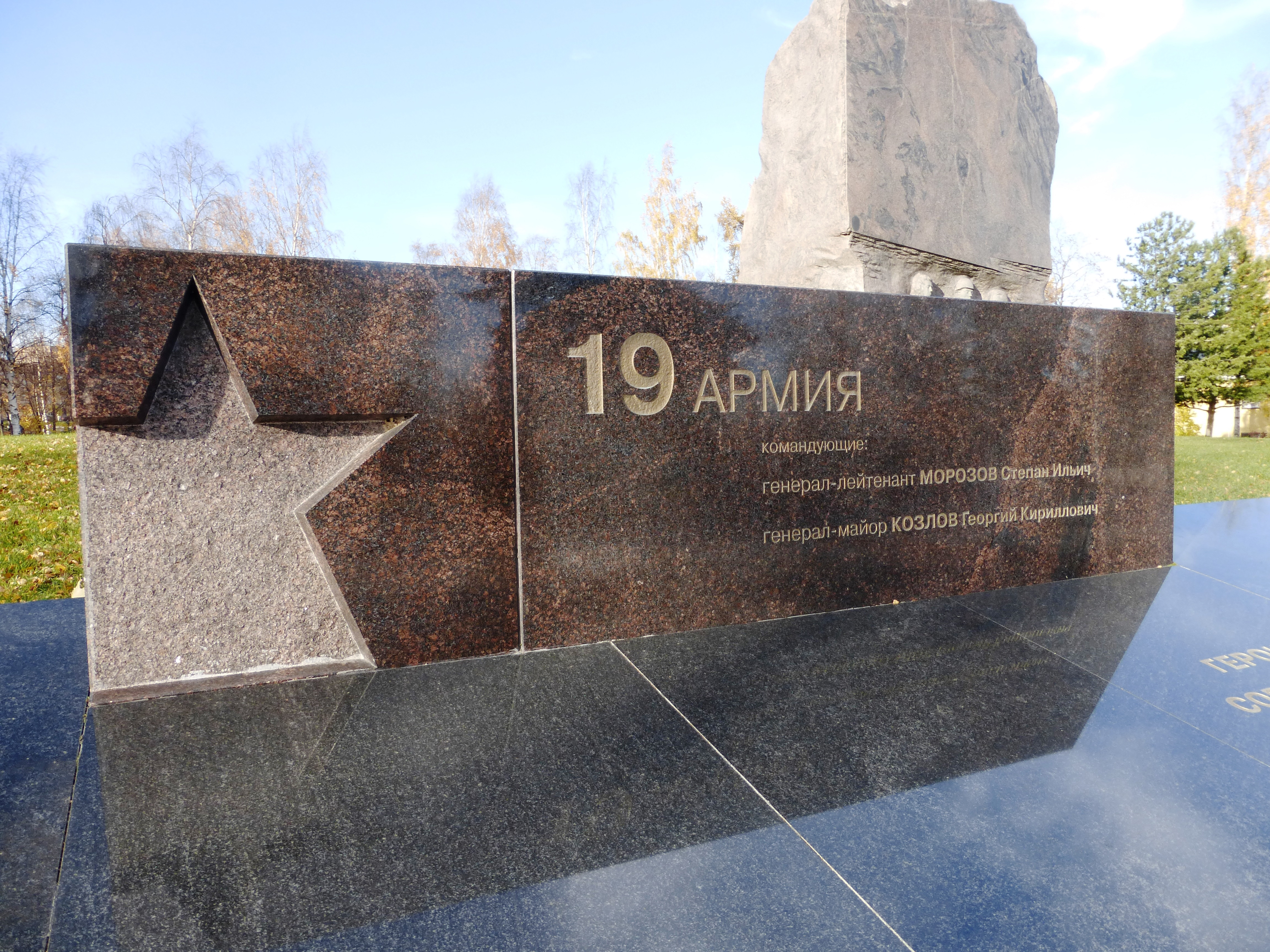 Фрагмент военно-мемориального комплекса Карельского фронта «Аллея памяти и славы» в Петрозаводске